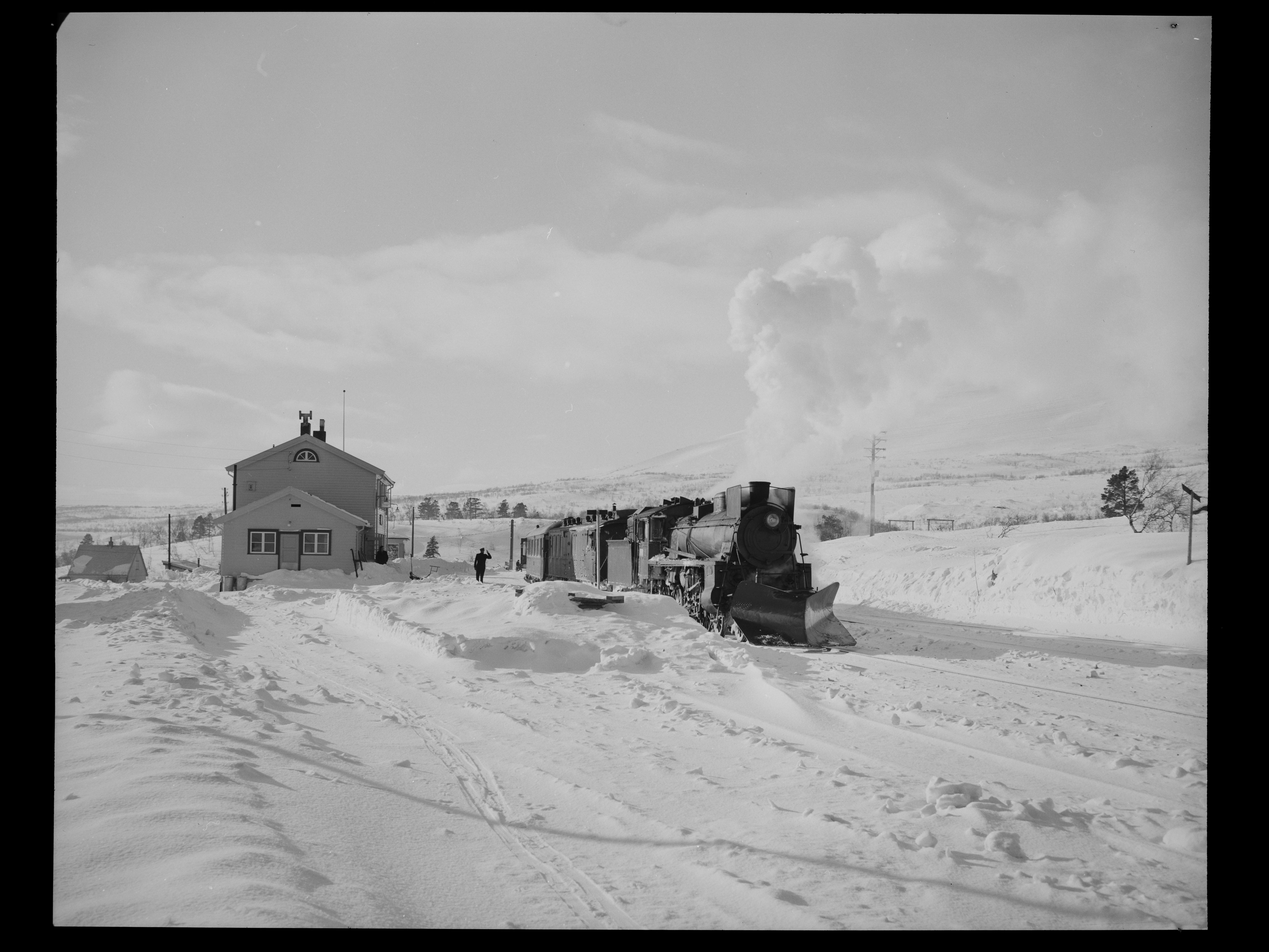 Bildet er hentet fra Nasjonalbibliotekets bildesamling Lønsdal,Saltfjellet, Saltdal, Nordland